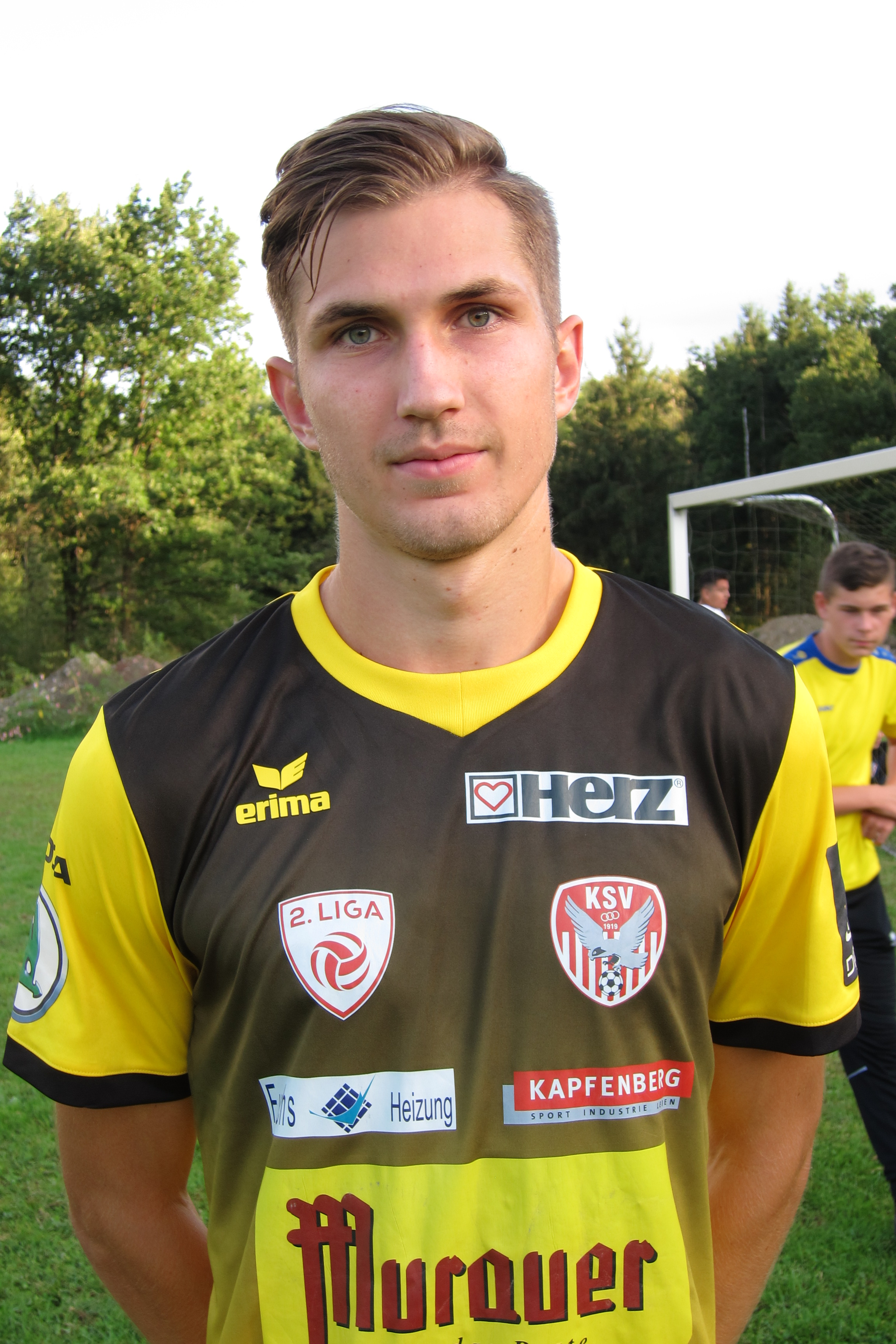 Matthias Puschl (KSV)